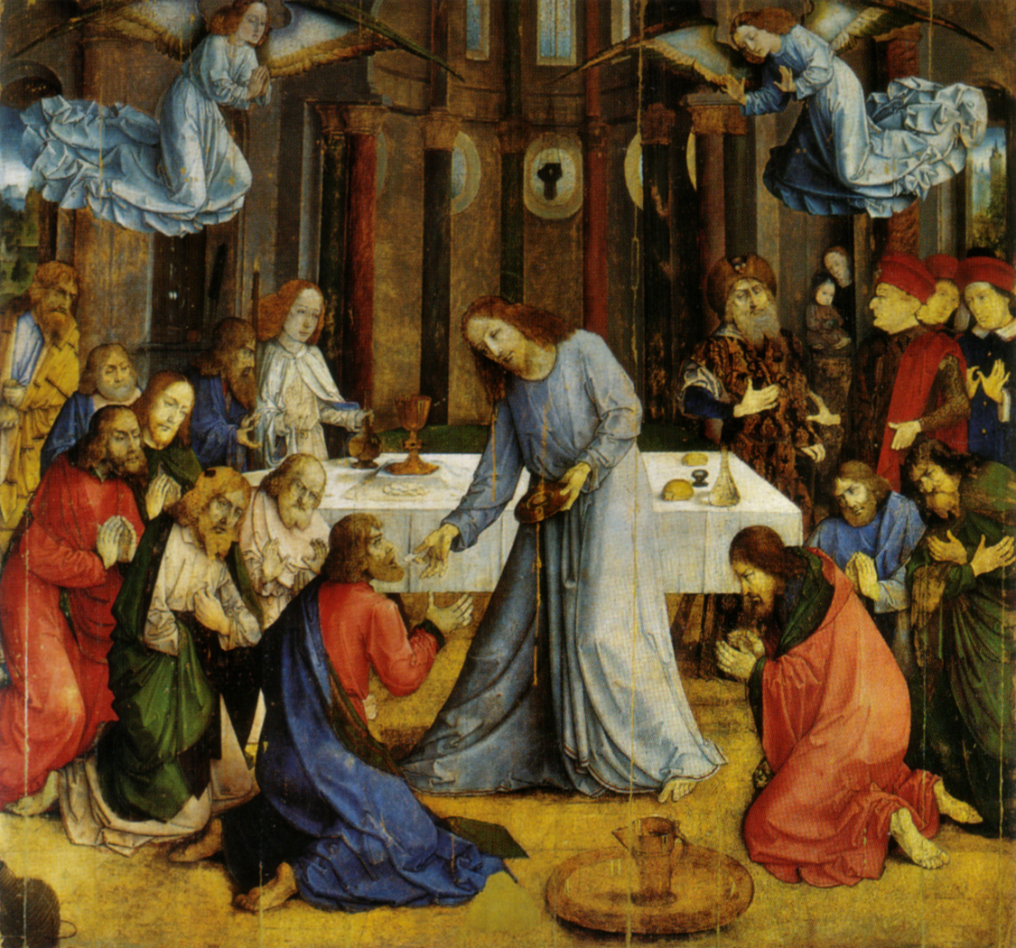 Giusto di gand, comunione degli apostoli, 1473-1474